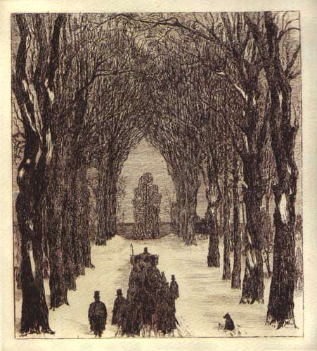 Als der Rosengarten Bern noch ein Friedhof war, Radierung von Otto Rast